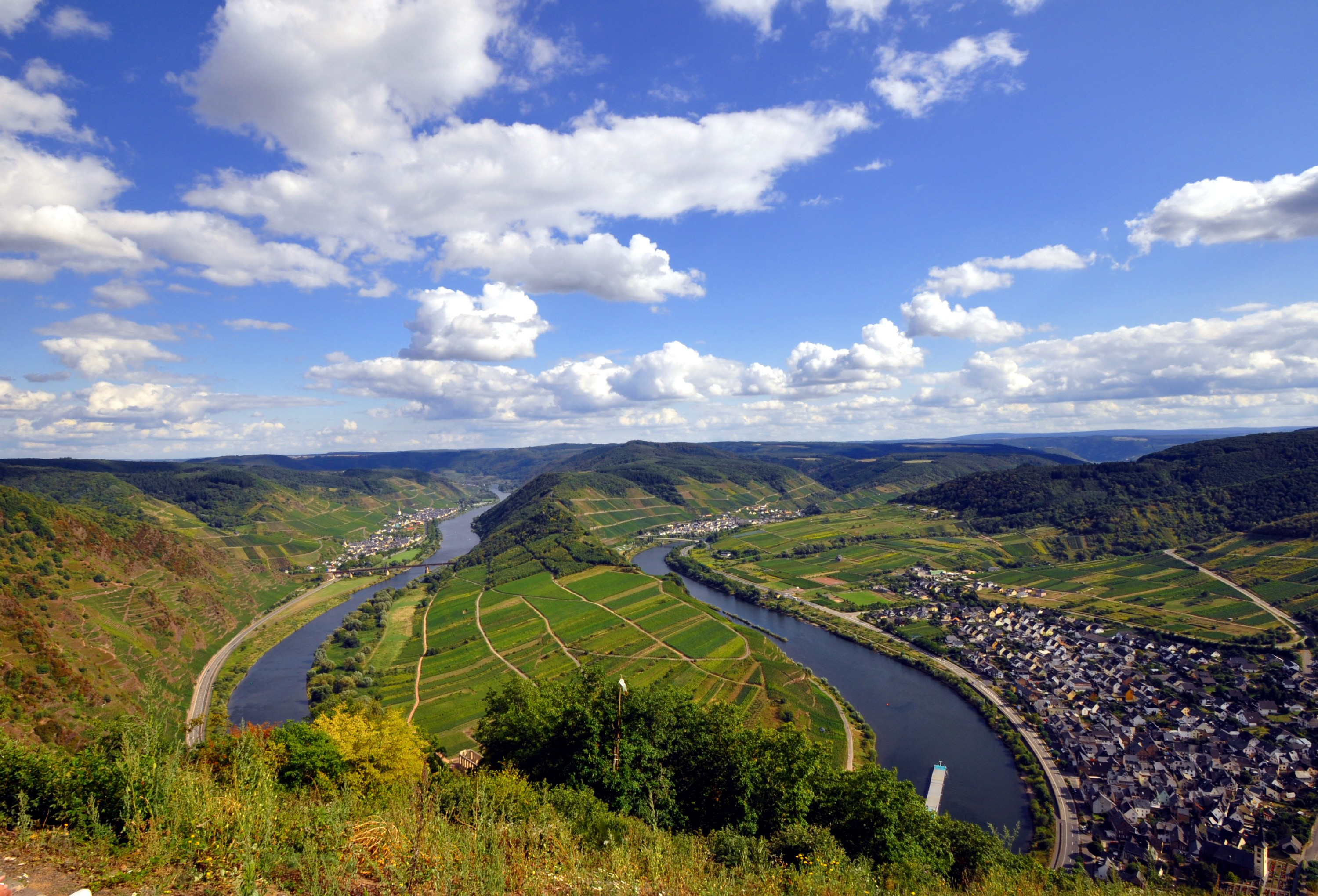 Blick vom Calmont auf die Bremmer Moselschleife mit Ediger-Eller (links) und Bremm (rechts)